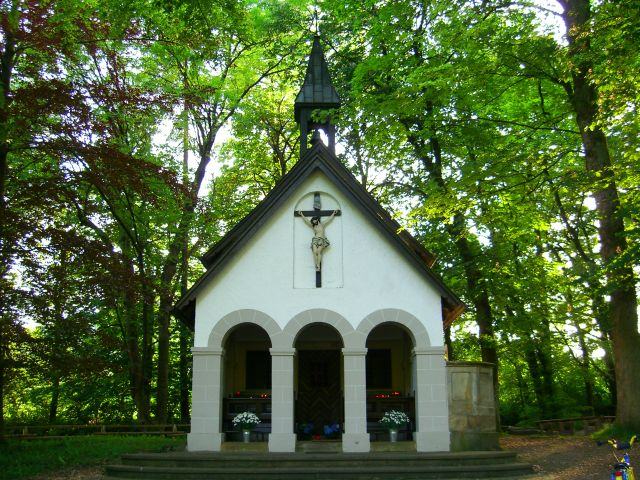 Antoniuskapelle bei Neuenheerse, Bad Driburg, Deutschland This is the photograph of an architectural monument. It is part of the list of cultural monuments of Bad Driburg, no. A 25